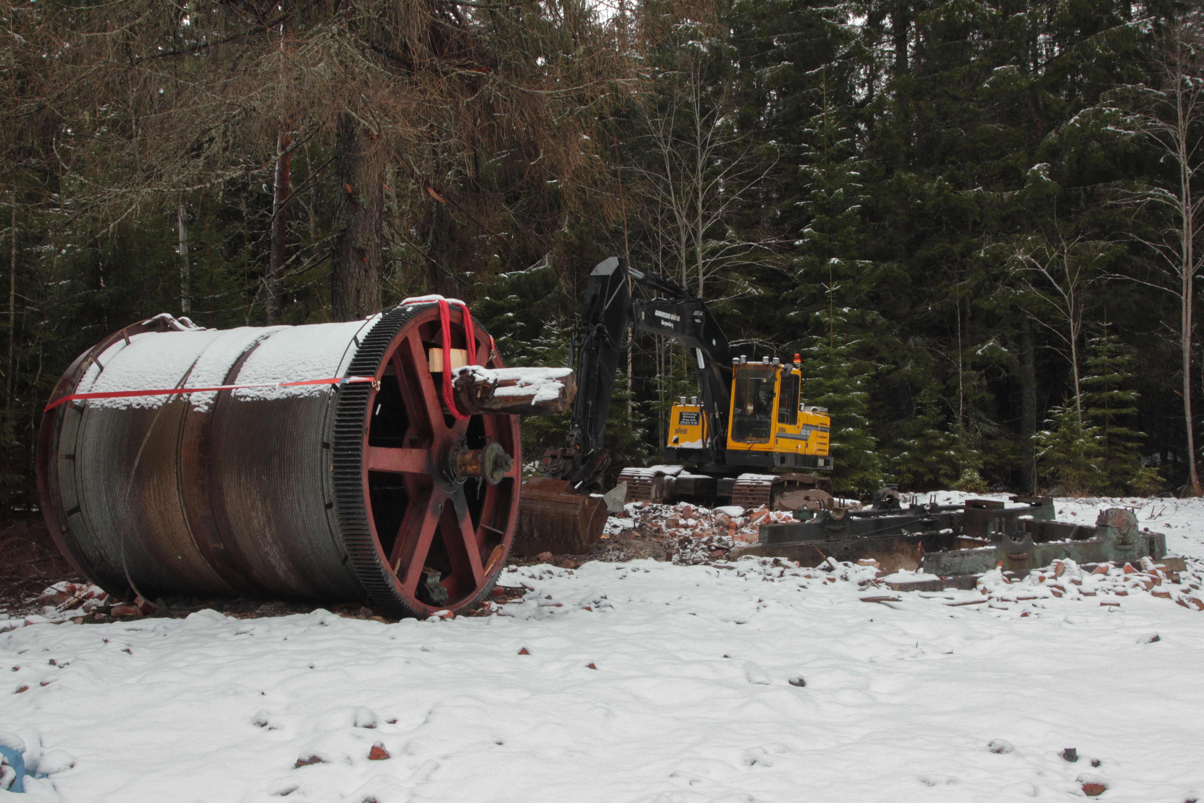 Rivning av Smältarmossgruvan, Garpenberg, Hedemora kommun, april 2012. Laven revs i september 2011.